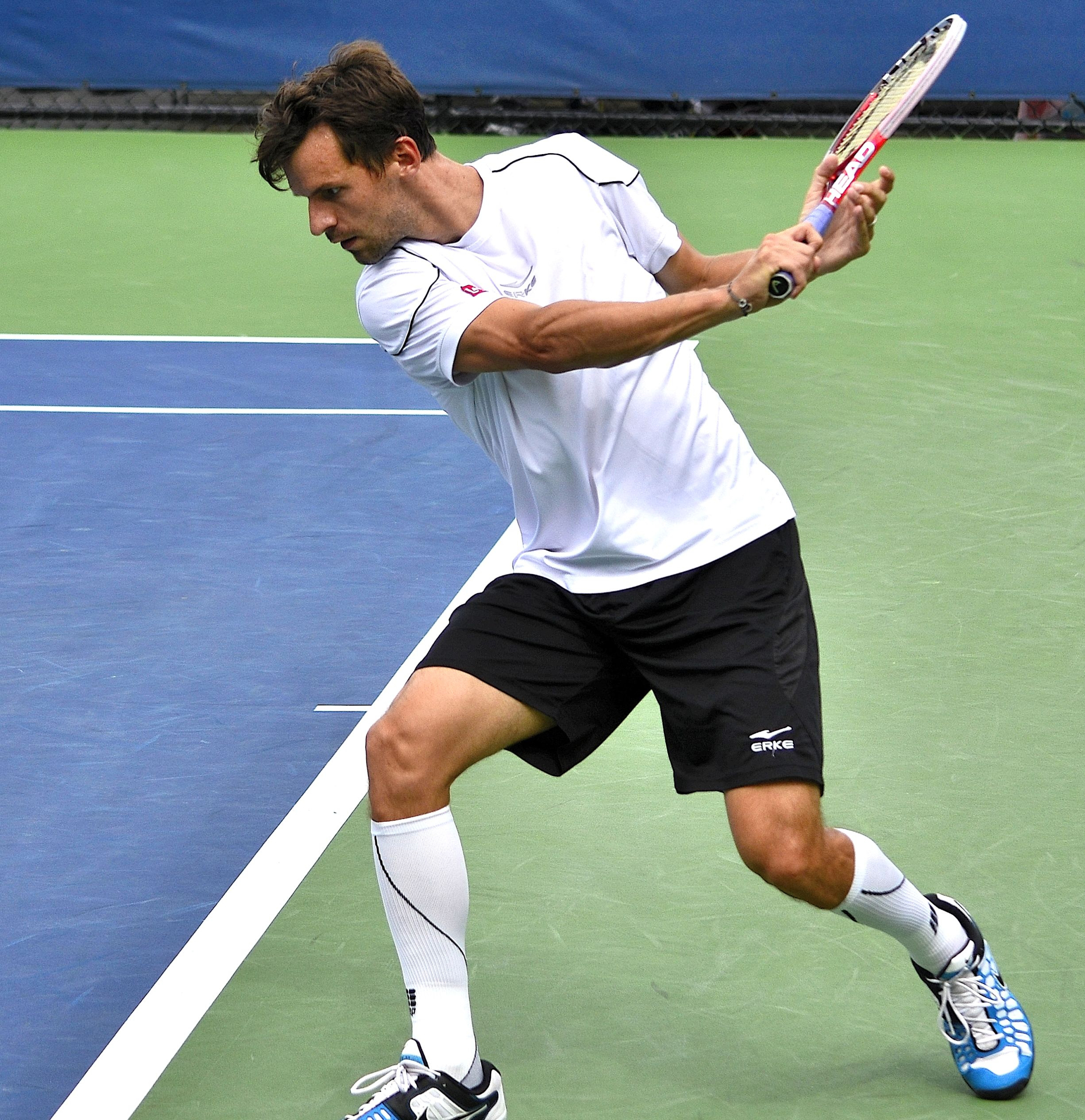 Queens, NY August 23, 2013 Philipp Petzschner (GER) def. Jared Donaldson (USA)